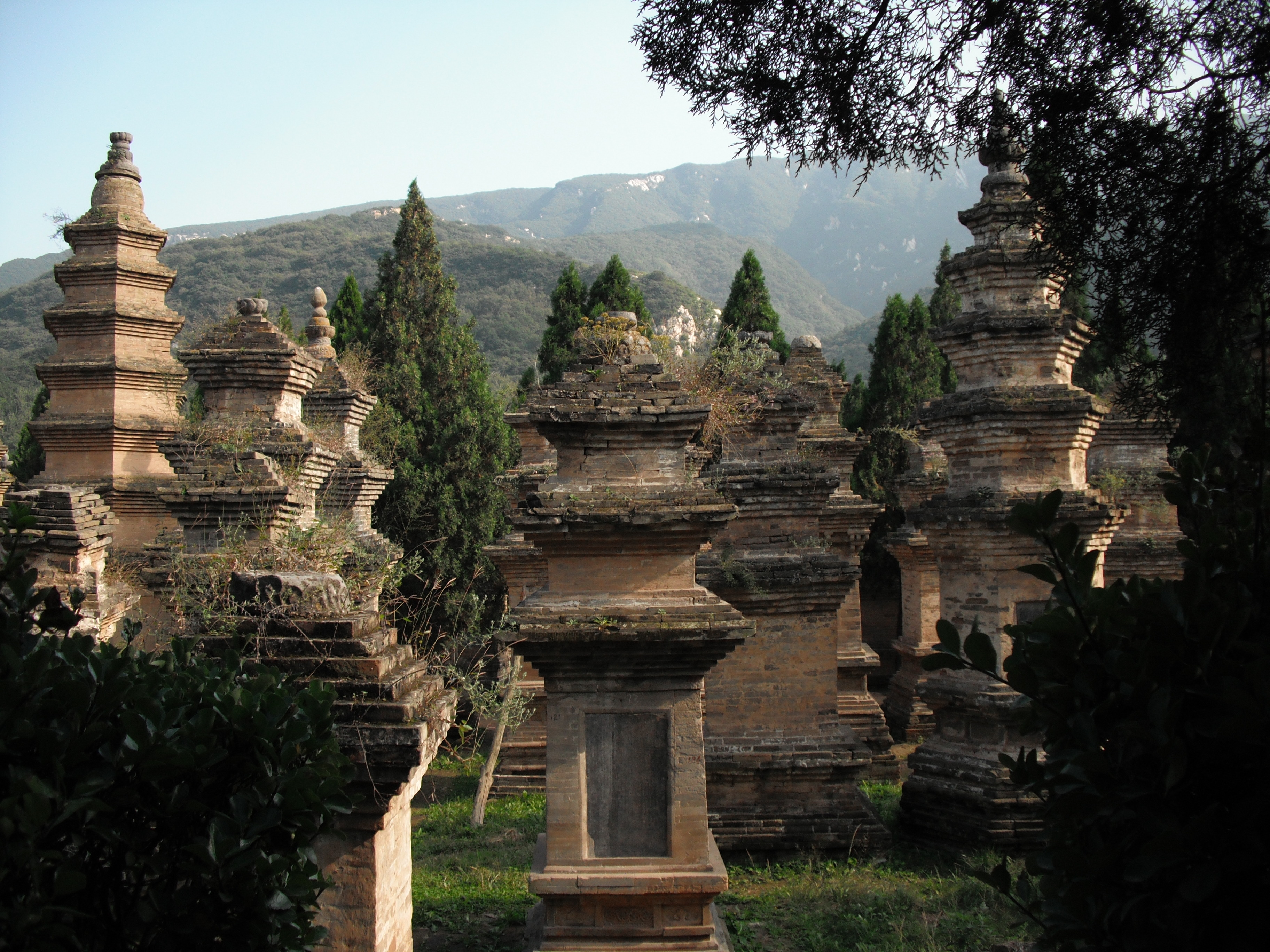 中文（中国大陆）: 少林寺塔林